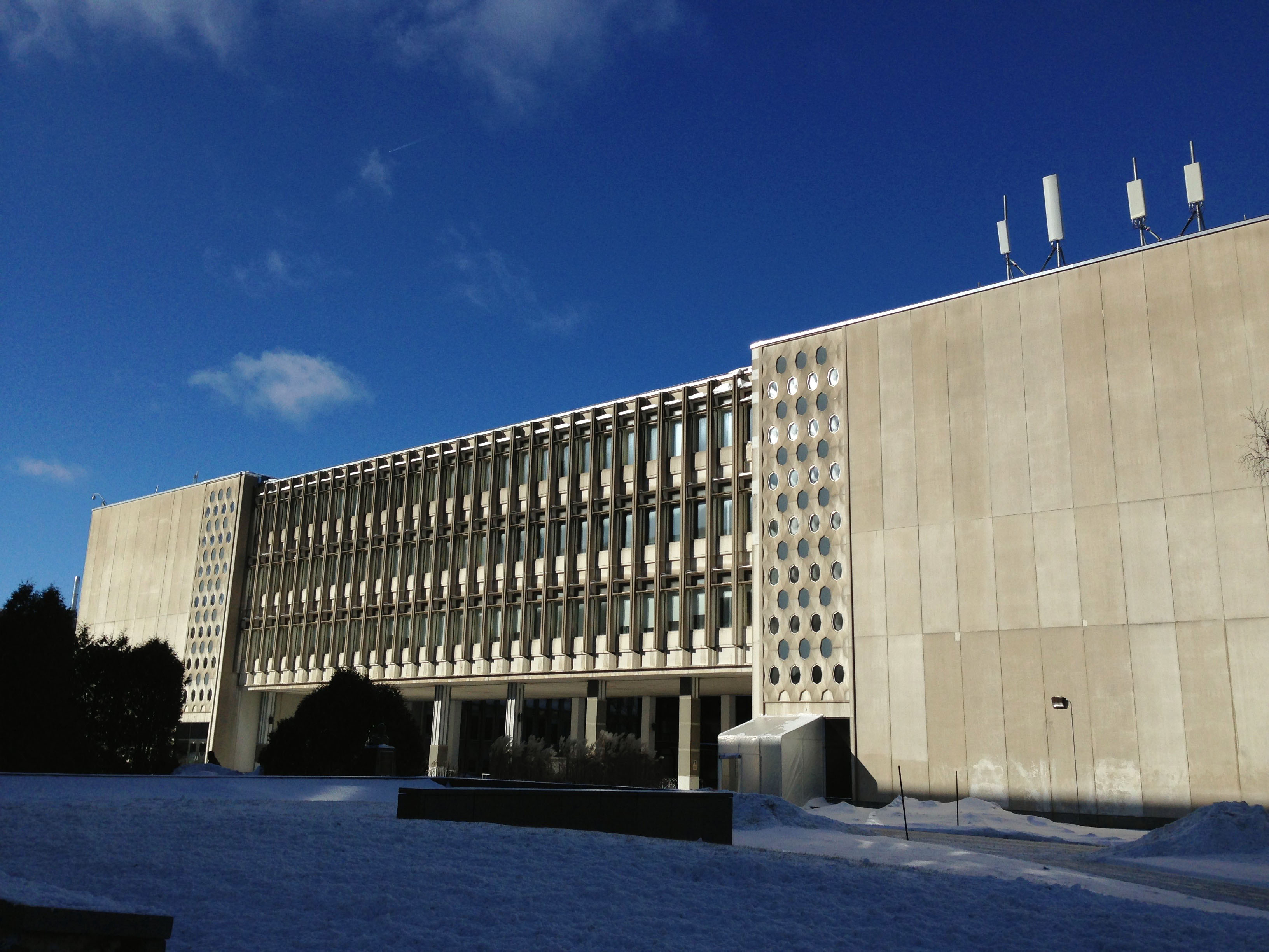 Pavillon Charles-De Koninck, Université Laval.